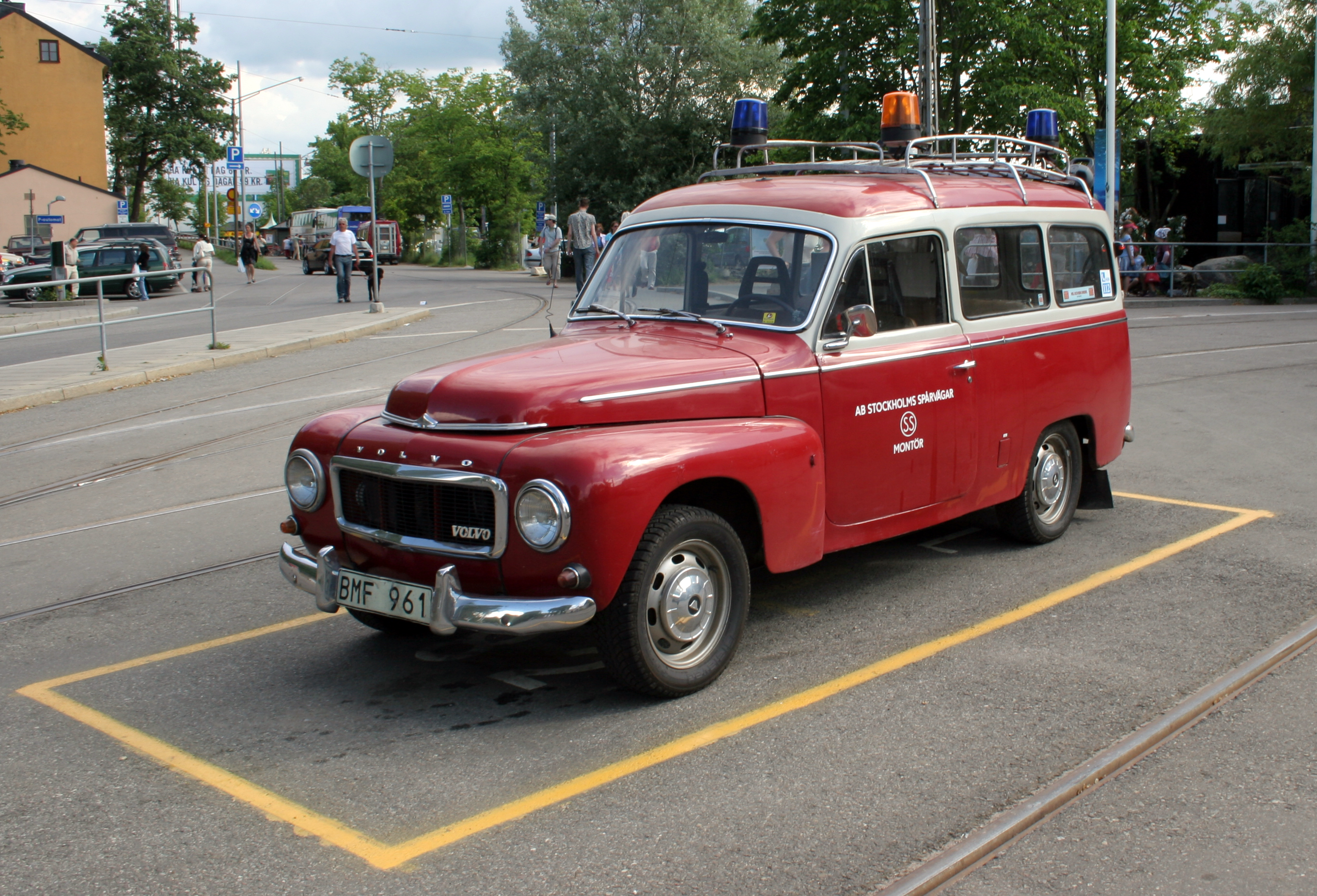 Volvo 211 owned by Stockholms spårvägar.